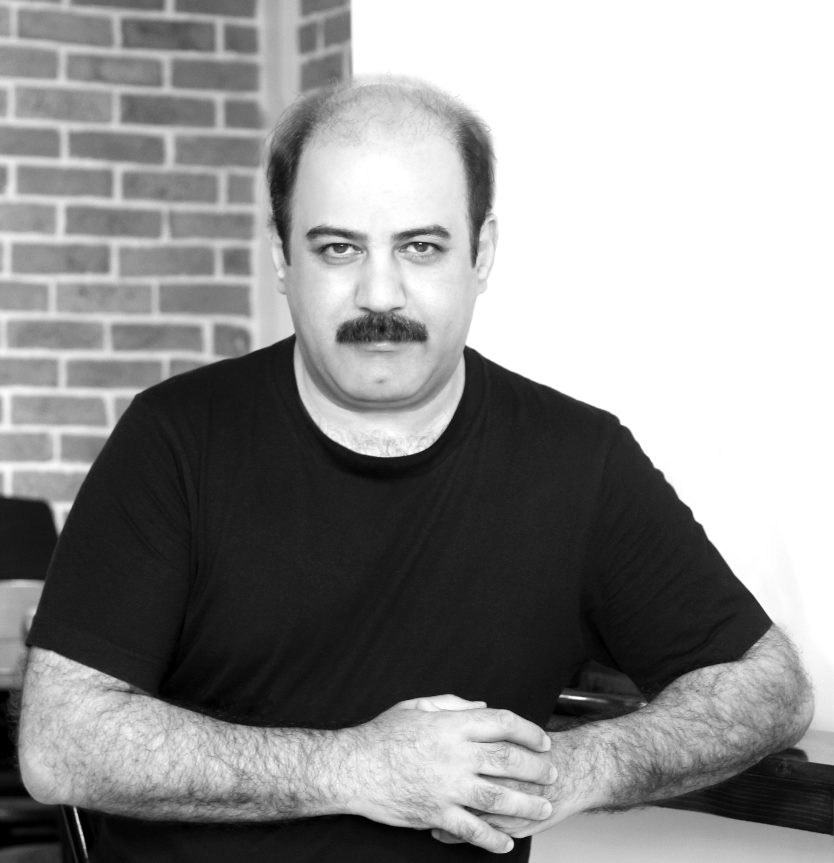 پیمان سلطانی